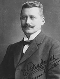 Erik Landewall, byggnadsinspektör